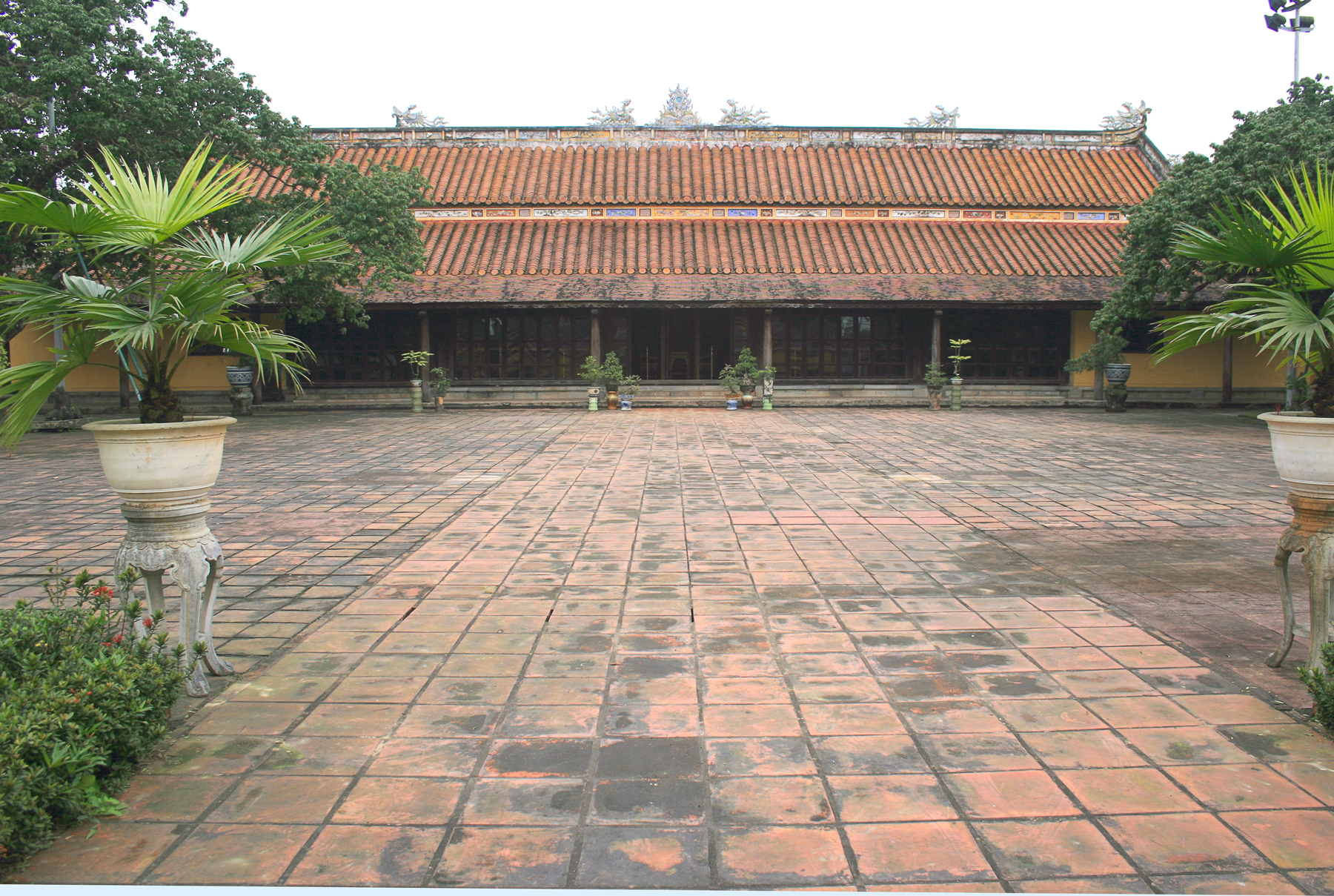 Chính điện Cung Diên Thọ